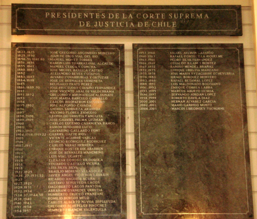 Vista de placa recordatoria de los Presidentes de la Corte Suprema de Justicia de Chile, ubicada en el Palacio de los Tribunales en la ciudad de Santiago..